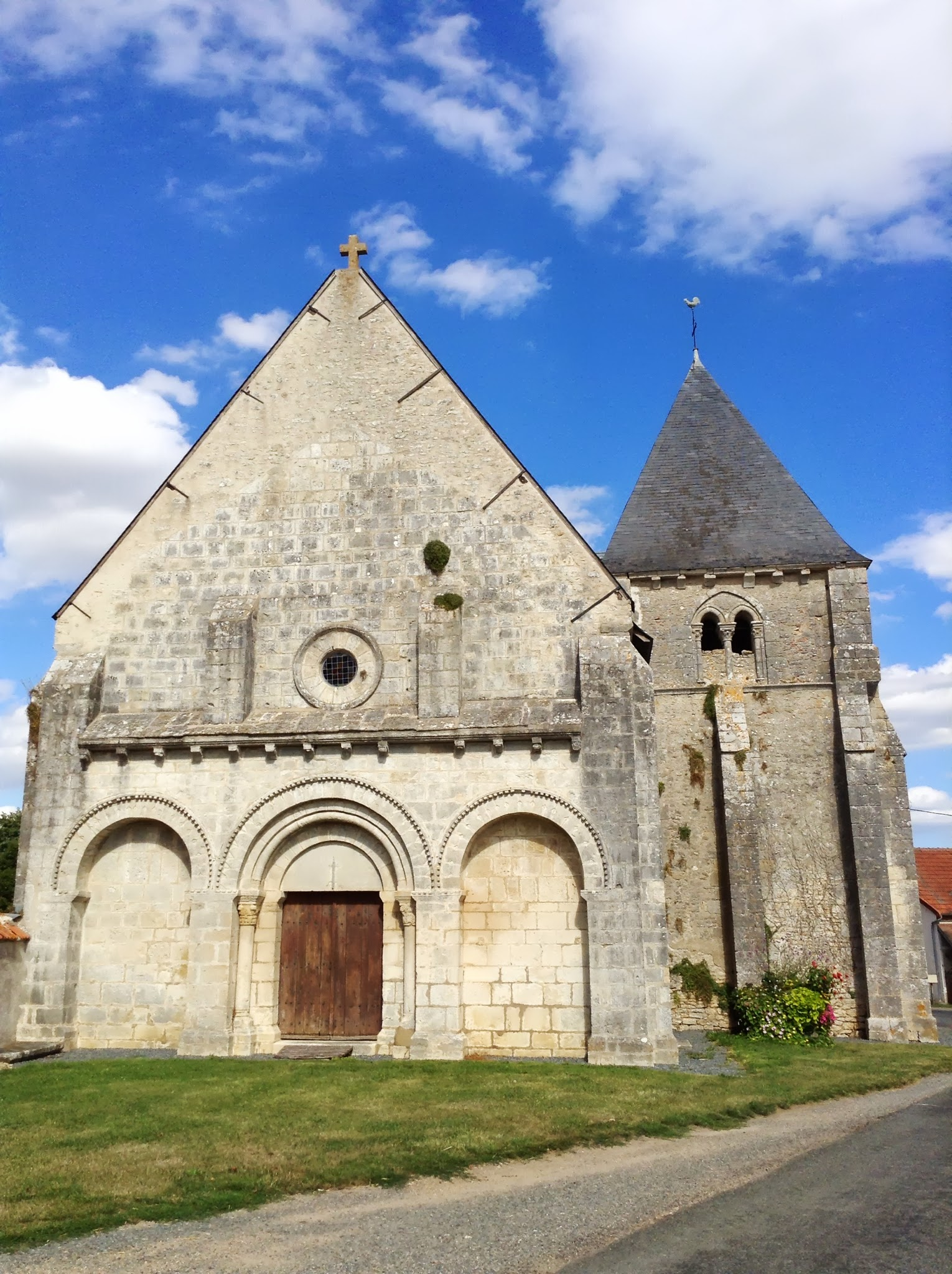 Église Saint-Martin de Montlouis (Cher)